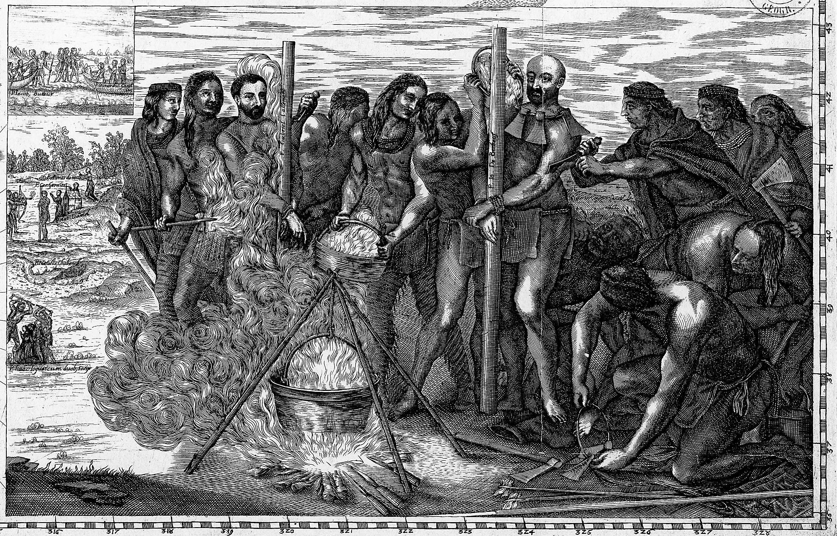 Cartouche sur la carte de la Nouvelle-France Novae Franciae accurata delineatio. (détail)